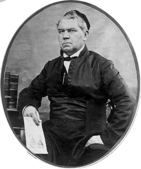 Pfarrer Alois Weisenburger, Diözese Speyer, Volksschriftsteller